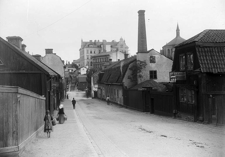 Erstagatan norrut från Åsögatan